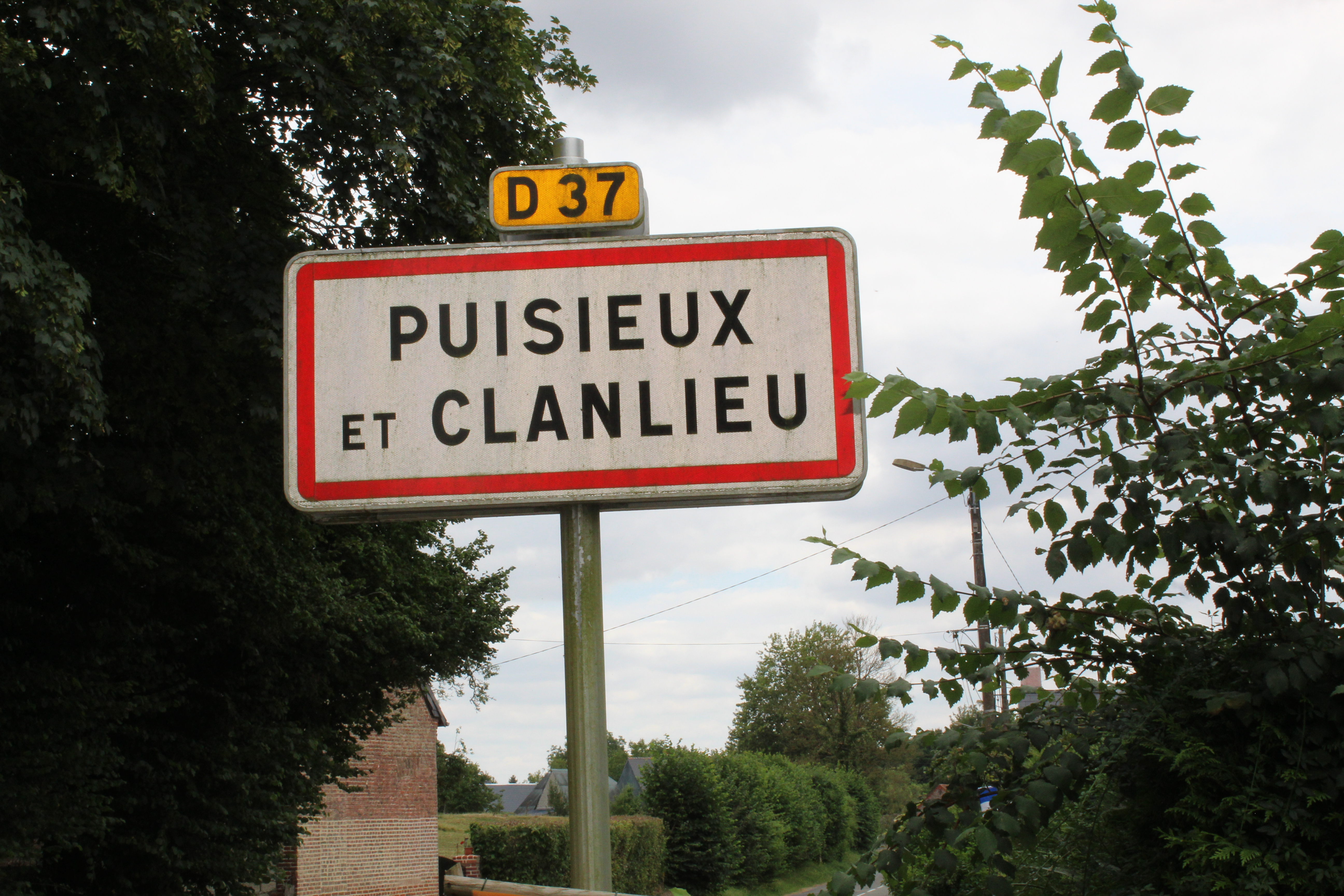 Entrée du village